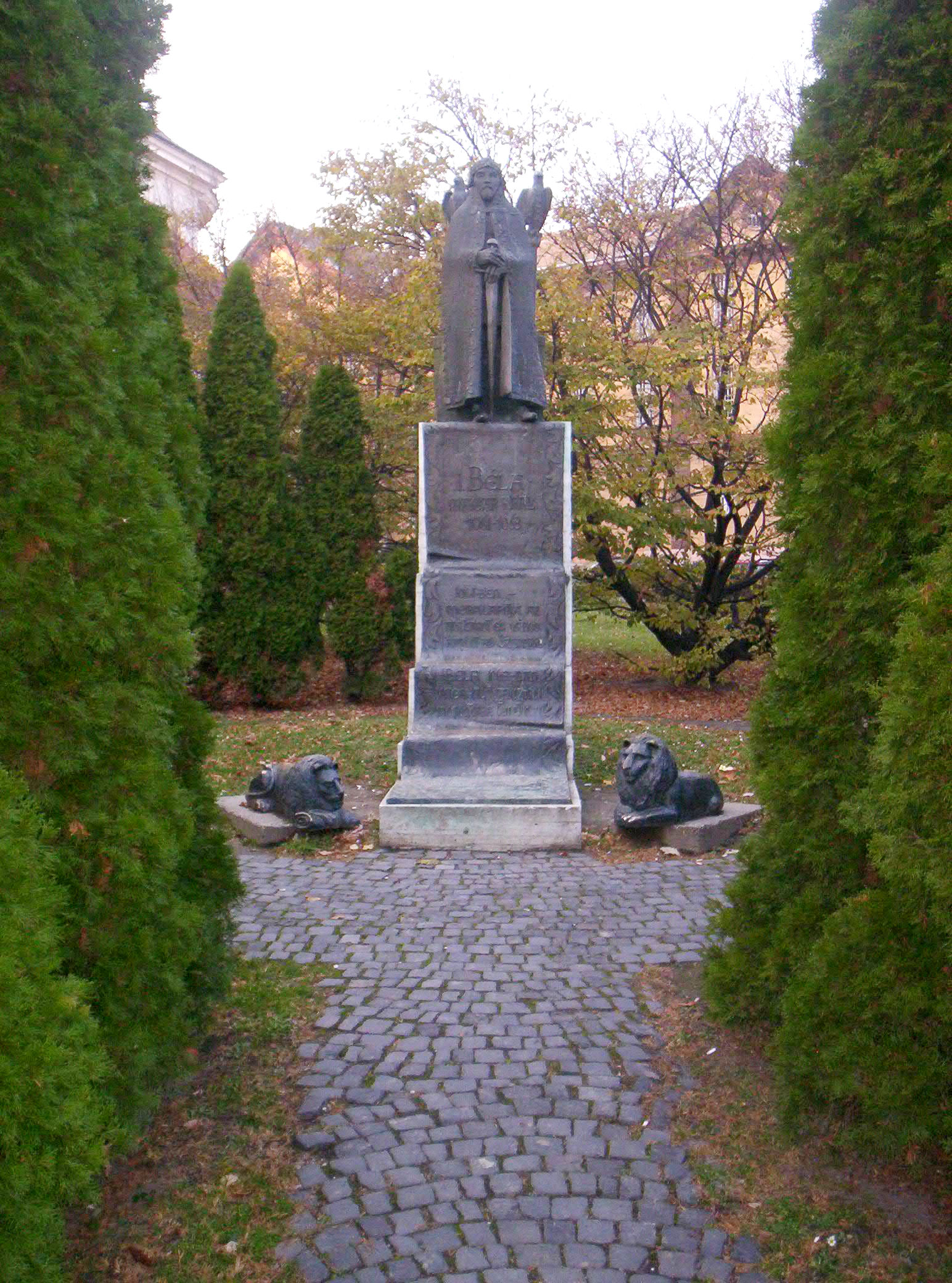 I. Béla szobra Szekszárdon. Lesenyei Márta alkotása (1986) – photo taken by uploader User:Csanády in 2006.